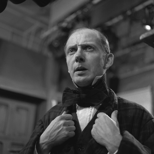 Herbert Joeks in De geest van Kerstmis in 1958